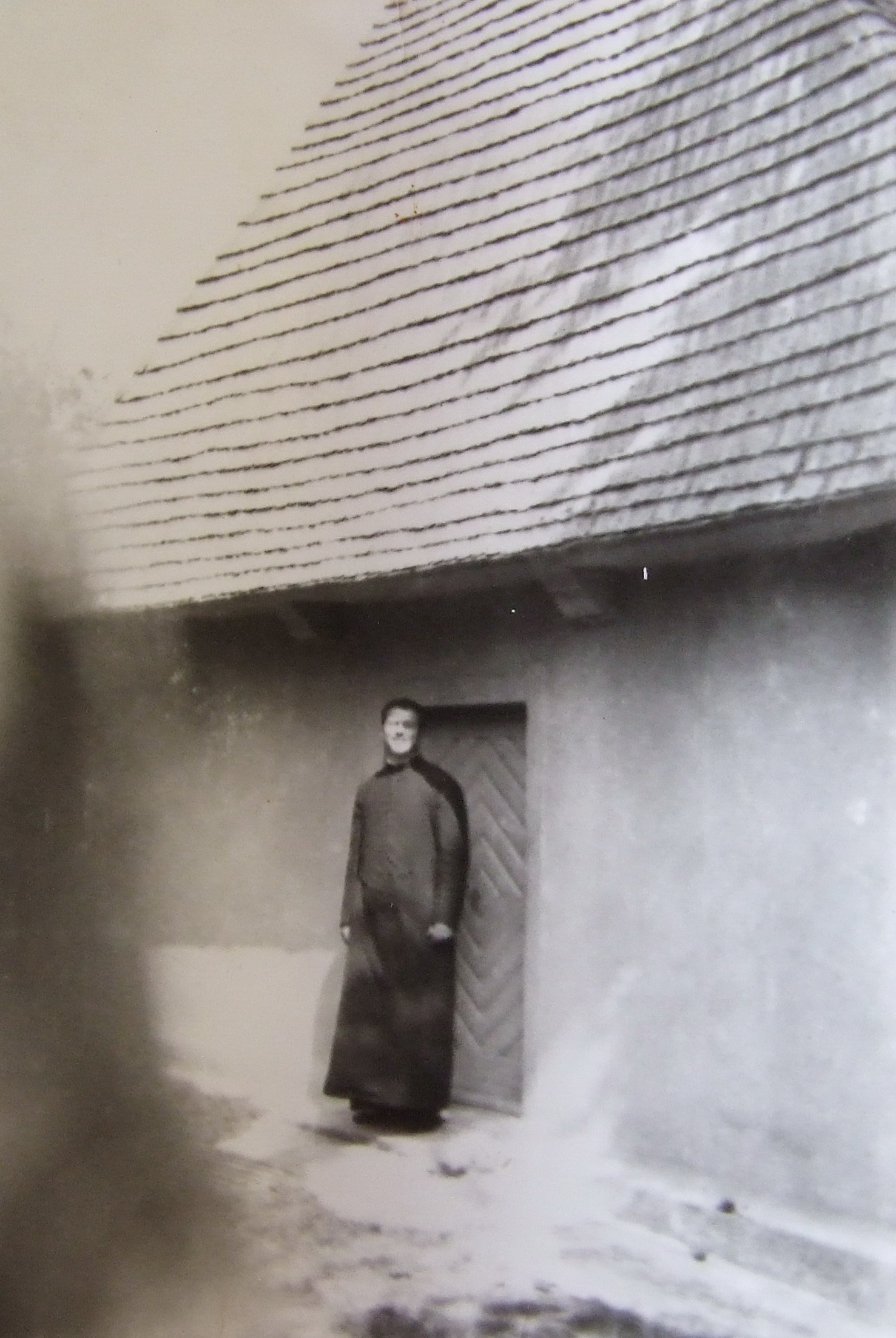 Biserica de lemn din Şutu, judeţul Cluj